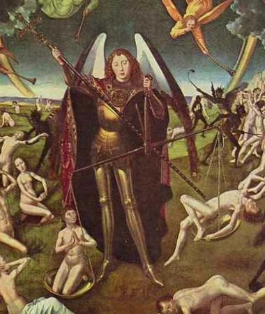 The Last Judgmentlabel QS:Lru,"Страшный судСтрашный суд (фрагмент), алтарь Якопо Тани" label QS:Len,"The Last Judgment"